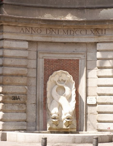 Fuente de los Delfines, de Ventura Rodríguez. Situada en un chaflán de las Escuelas Pías de San Antón, en Madrid (España).